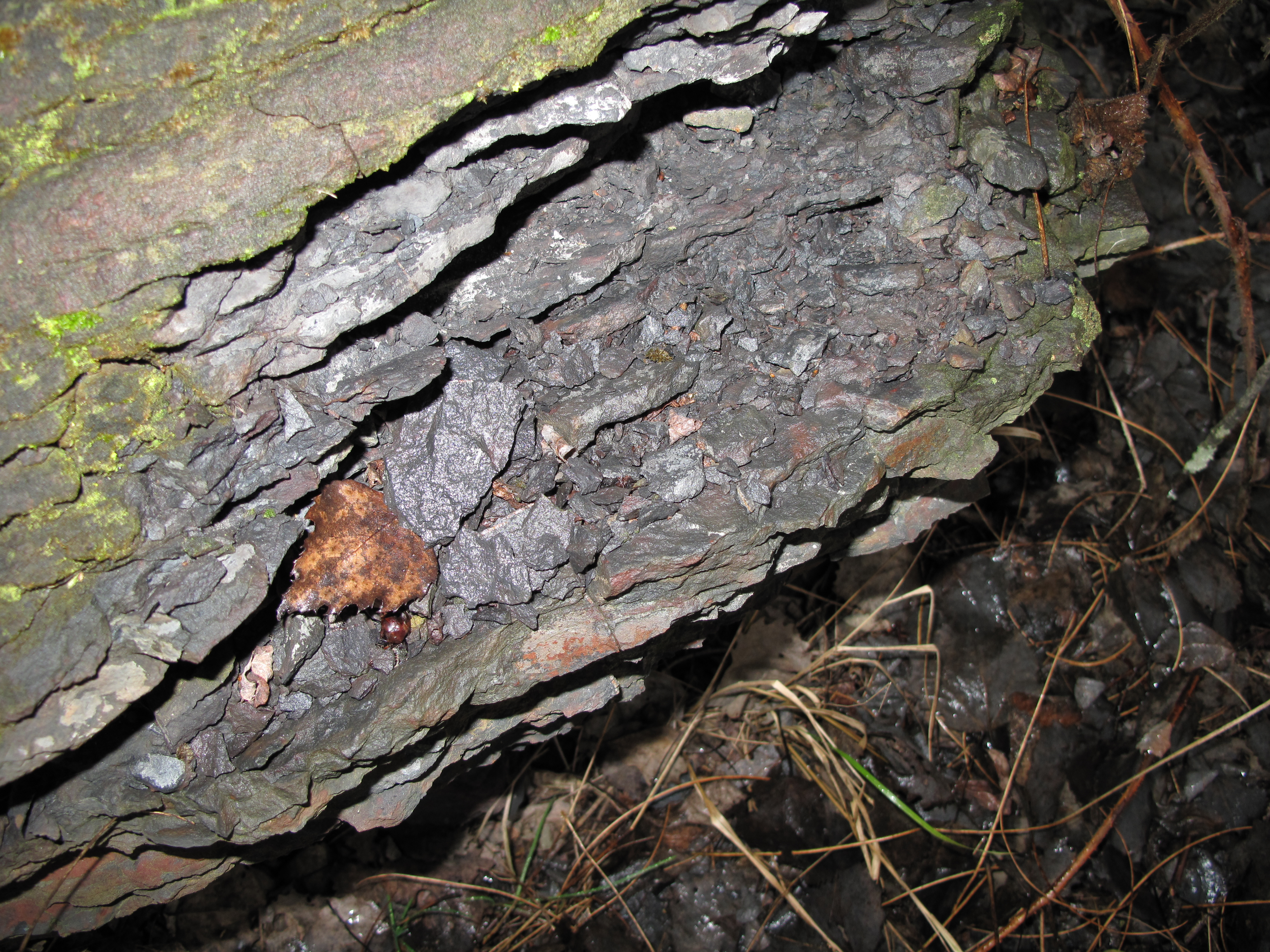 Rozpadající se balvan v přírodní památce Ejpovické útesy. Okres Rokycany, Česká republika.